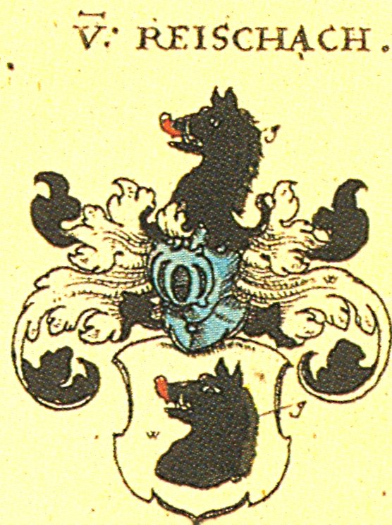 Johann Siebmacher: New Wappenbuch eingescannt aus: Horst Appuhn (Hrsg.), Johann Siebmachers Wappenbuch. Die bibliophilen Taschenbücher 538, 2. verb. Aufl , Dortmund 1989 Ritterschaft und Adel in Schwaben: v. Reischach Blatt 112